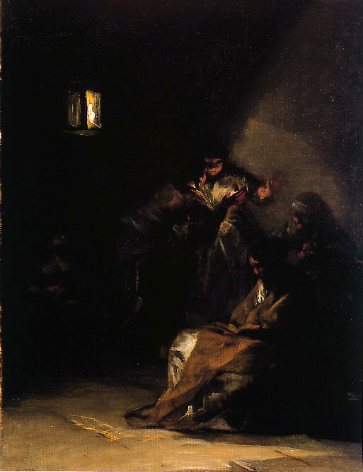 Interior de una cárcel (Crimen del castillo II). Óleo sobre lienzo. 41,5 x 31,8 cm. Colección Marqueses de la Romana (Madrid, España).